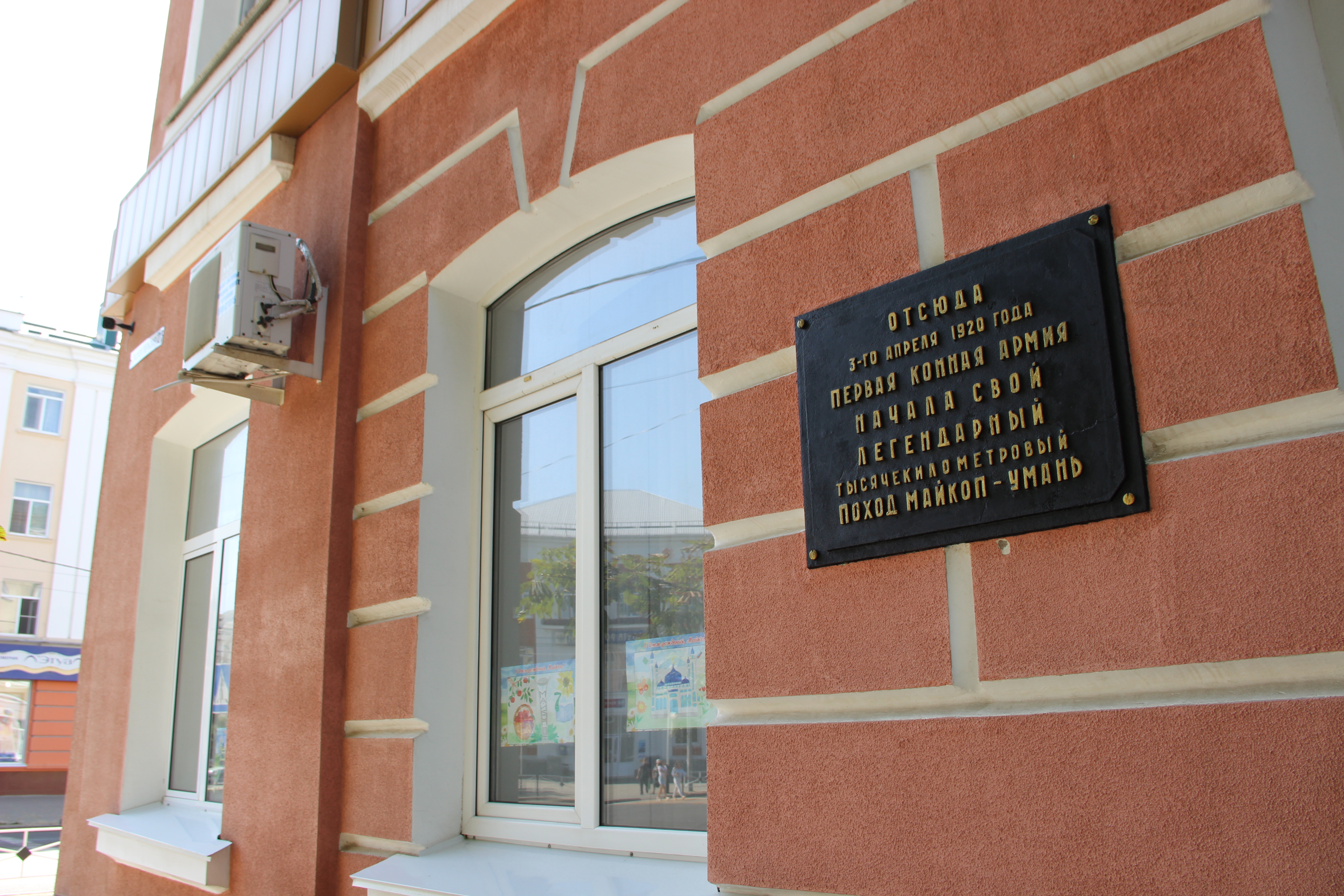 Место, откуда начался поход 1-й конной армии Майкоп-Умань. Установлен памятный знак: улица Краснооктябрьская, 21, Майкоп, Адыгея